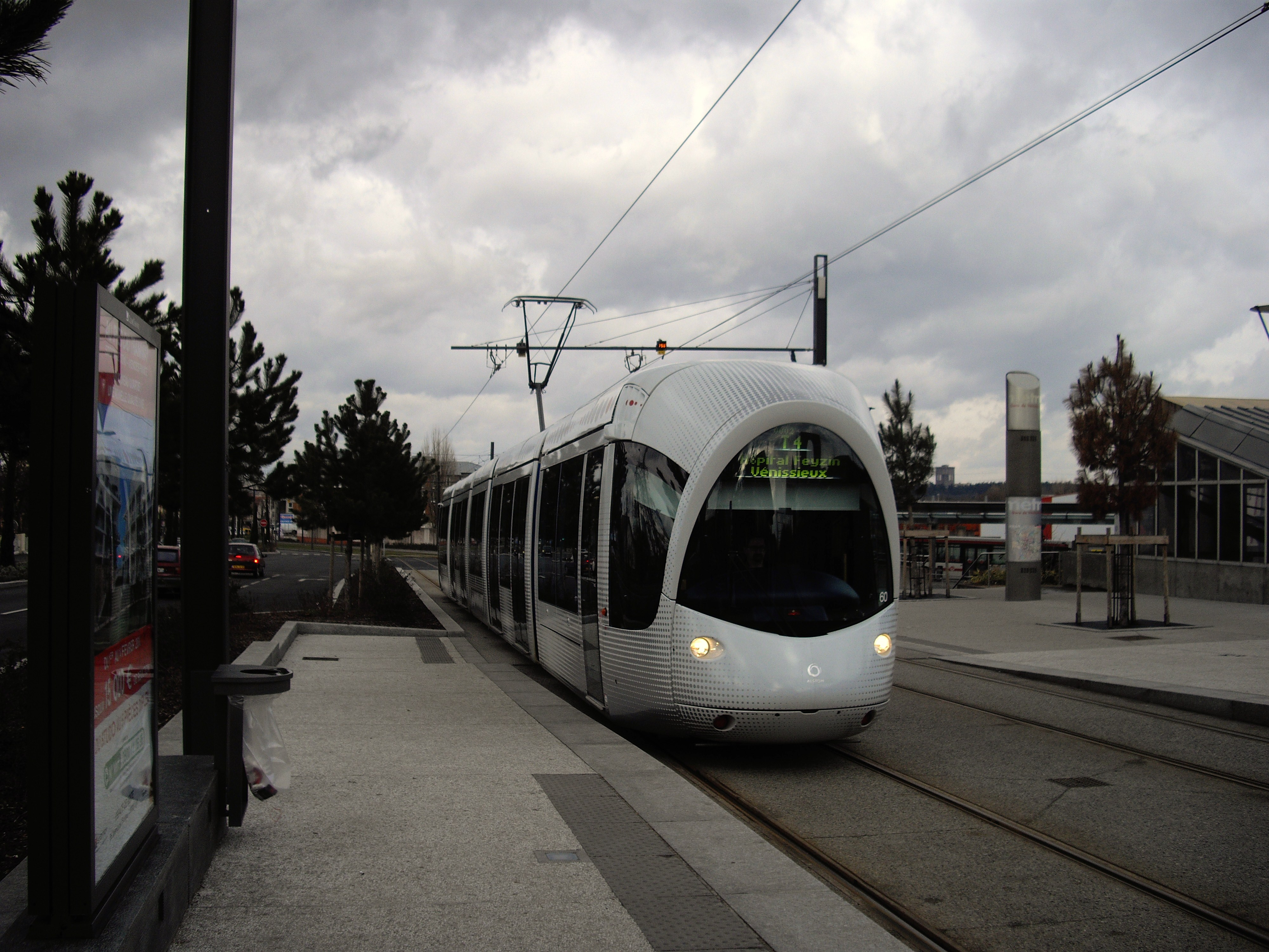 Alstom Citadis 302 - Tramway de Lyon - Ligne T4 - Station Gare de Vénissieux, direction Hôpital Feyzin Vénissieux